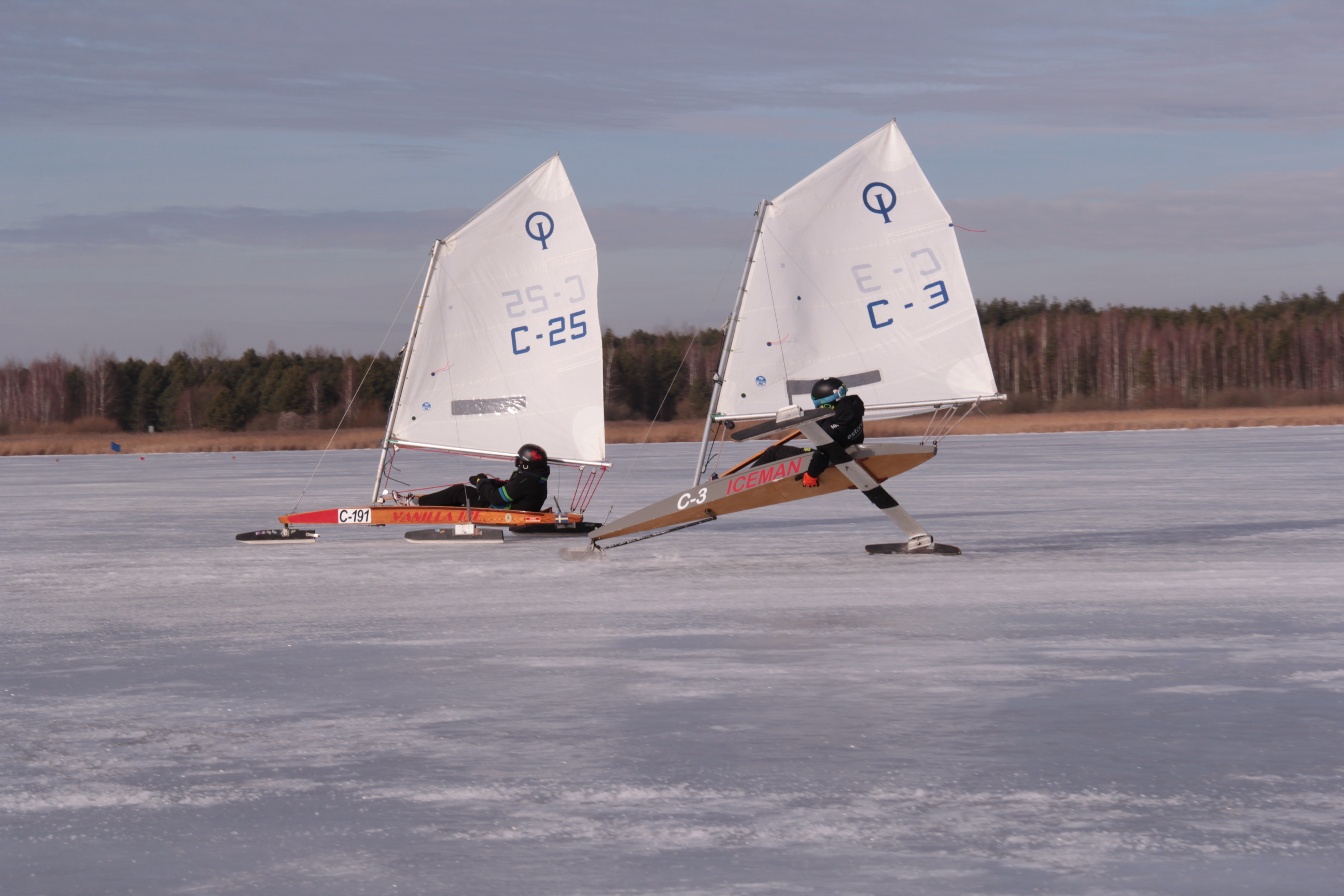 IceOptimist Junior sailors in the heat of the regatta